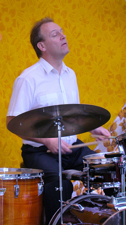 Rumpali Tomi Parkkonen soittamassa Arabia-Toukolan kyläjuhlilla 2003.